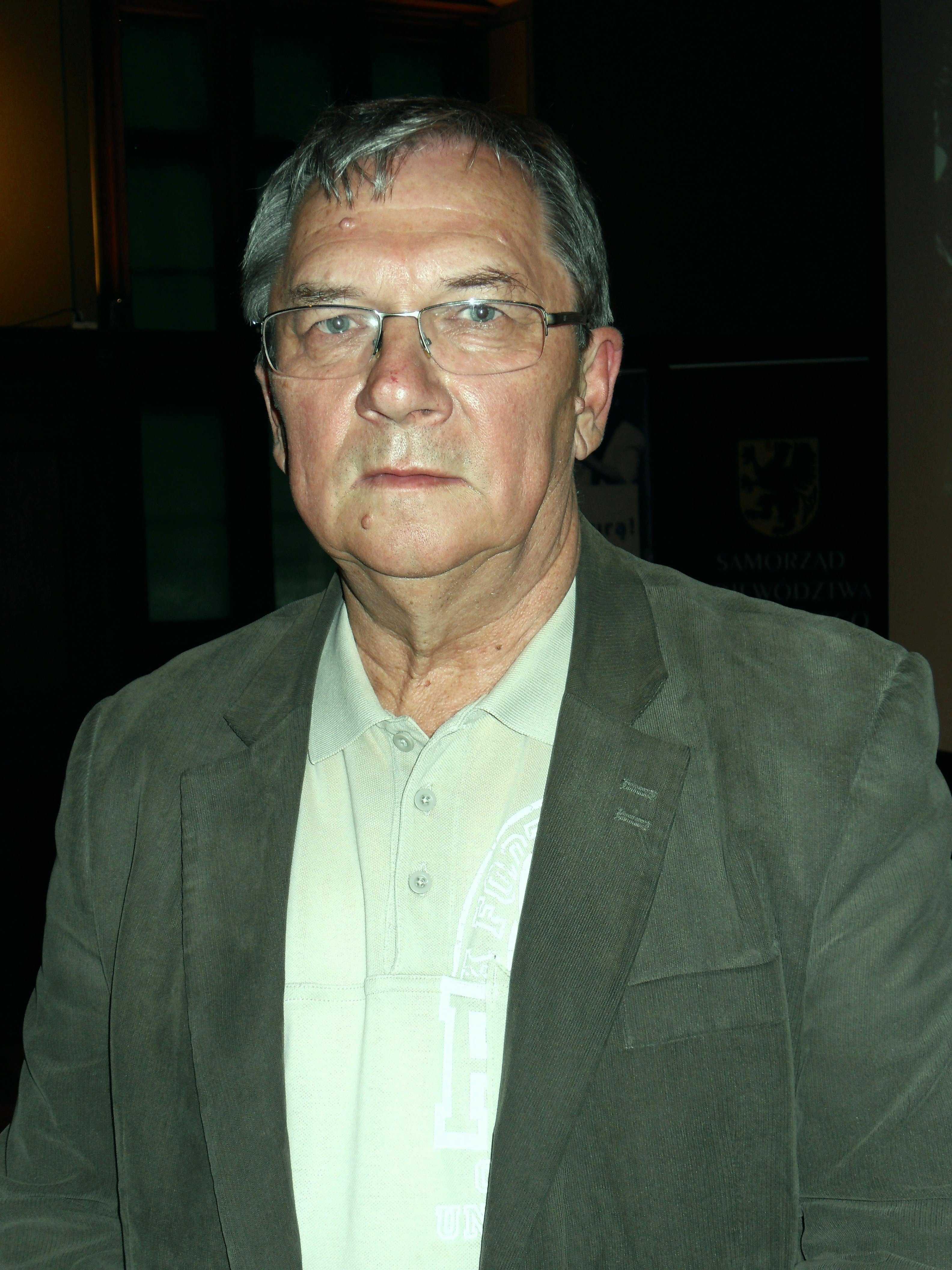 Profesor Cezary Paszkowski, gdański malarz i grafik.